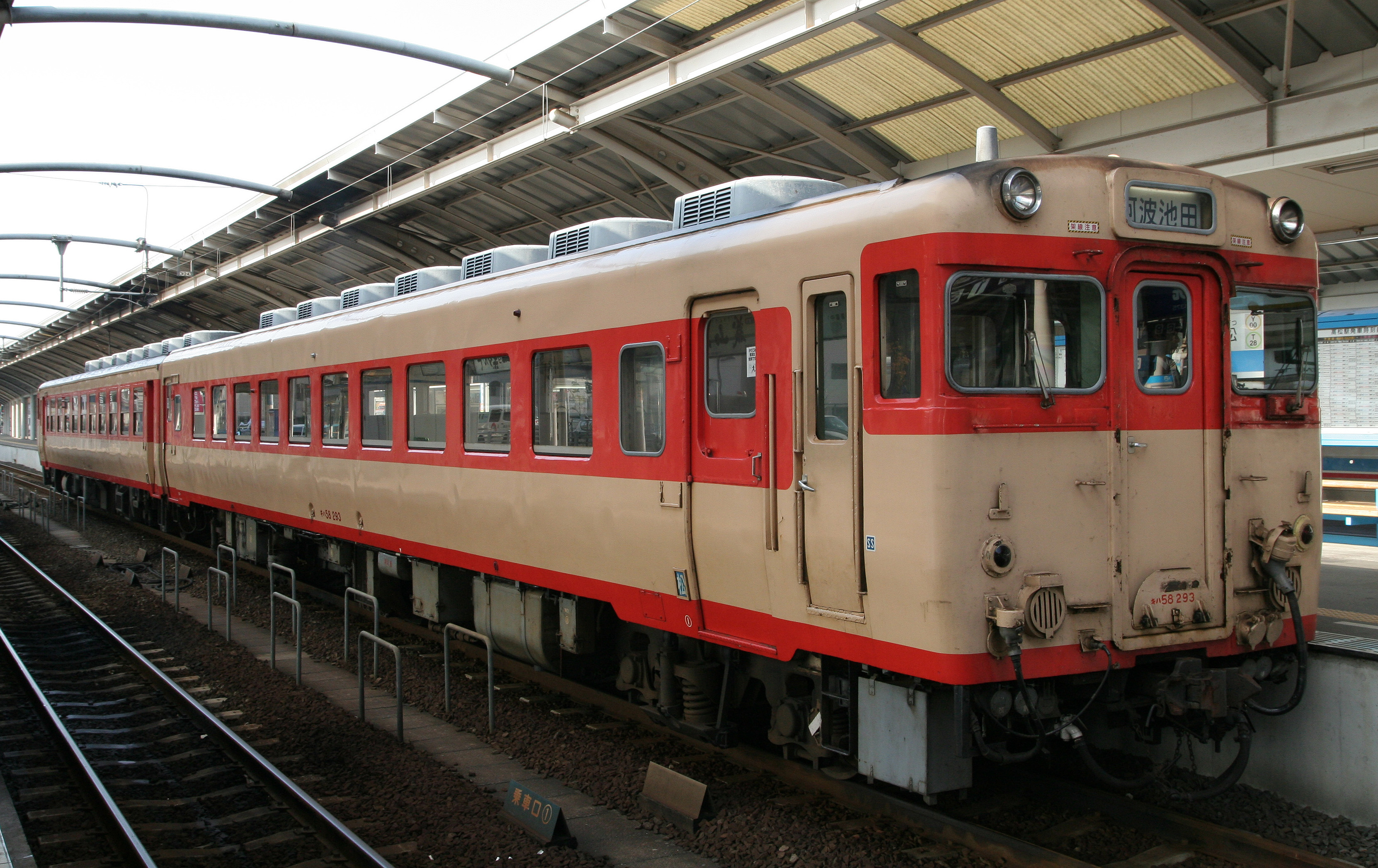 JR四国キハ58形293 国鉄色 高松駅